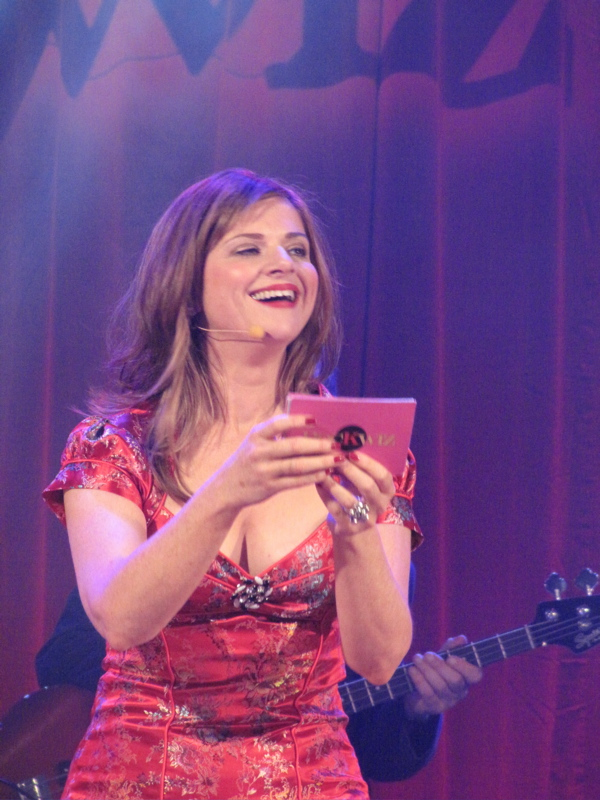 Julia Zemiro